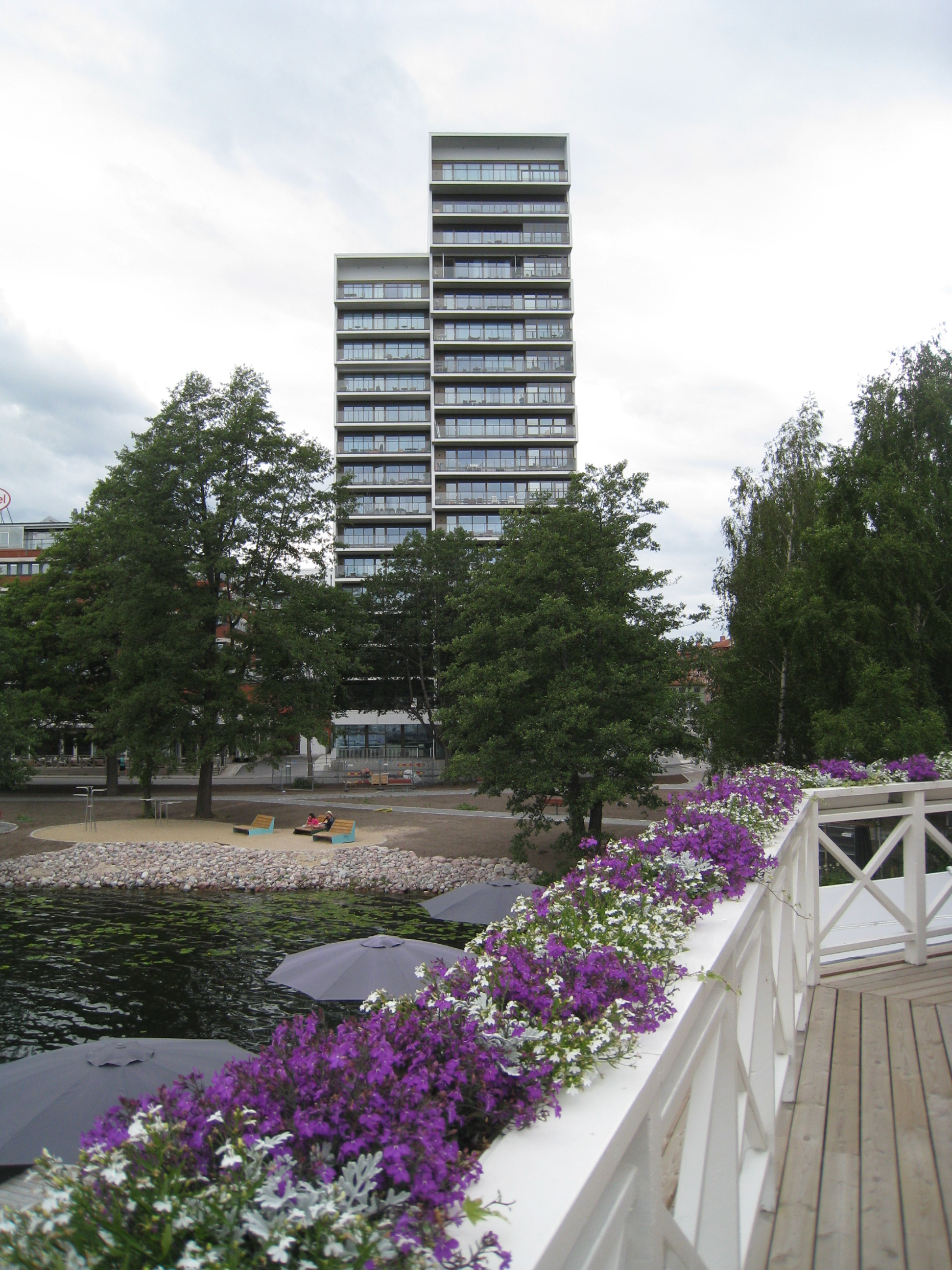 Alviks Torn, Alvik, Bromma, Stockholm. Vy från Alviks Strand.